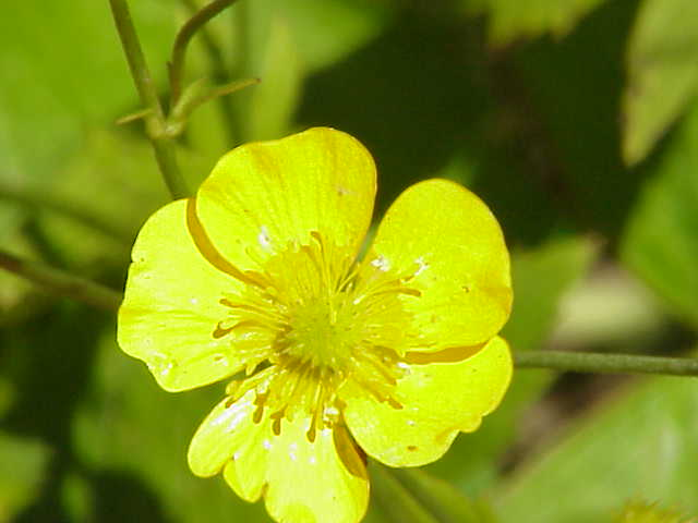 Species: Ranunculus auricomus Family: Ranunculaceae Image No. 1